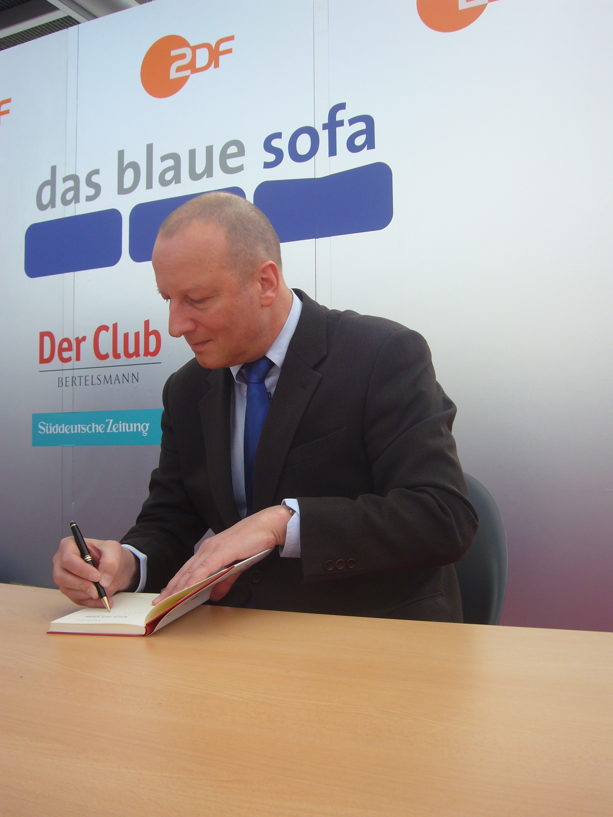 Dieses Fotos dürfen Sie honorarfrei nutzen, wenn Sie folgenden credit beachten: Copyright: Das blaue Sofa / Club Bertelsmann. Roger de Weck, geboren 1953, lebt in Berlin und Zürich. Er moderiert die Fernsehsendung Sternstunden Philosophie des Schweizer Fernsehens SF DRS, ist Präsident des traditionsreichen Graduate Institute of International and Development Studies in Genf und lehrt am College of Europe in Brügge und Warschau. Zuvor war er Chefredakteur der Hamburger ZEIT und des Zürcher Tages-Anzeigers. Der Volkswirt ist Herausgeber der außenpolitischen Buchreihe Standpunkte, Stiftungsrat des Karlspreises in Aachen, Ehrendoktor der Universität Luzern und Träger des Medienpreises Davos. Zu Beginn des Jahres 2011 wird er Generaldirektor der Schweizerischen Radio- und Fernsehgesellschaft (SRG SSR idée suisse).